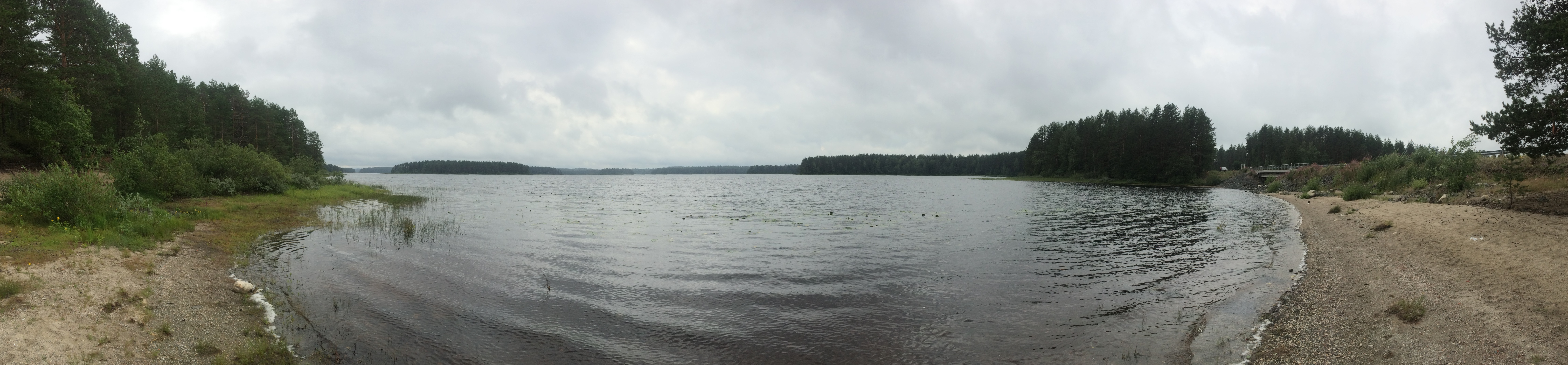 Уксуярви